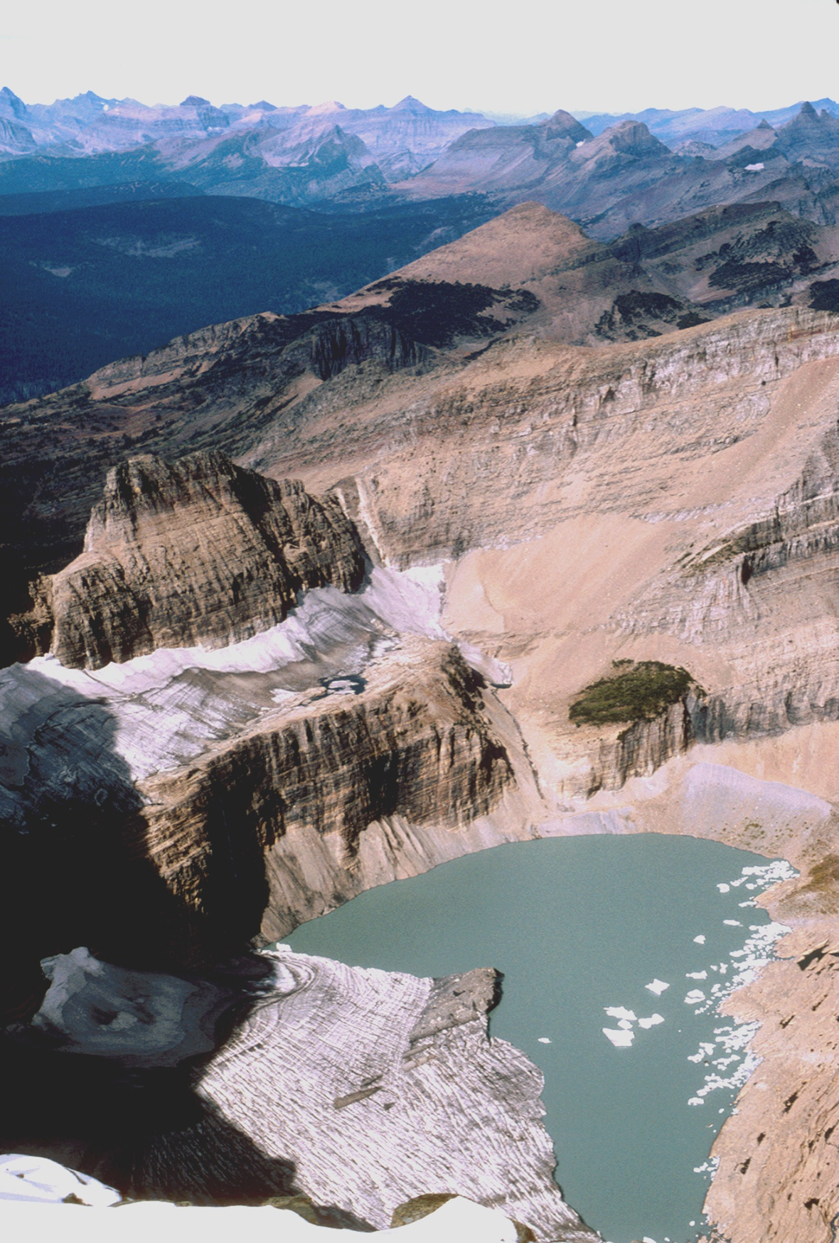 Grinnell Glacier in Glacier National Park (US) in 1998